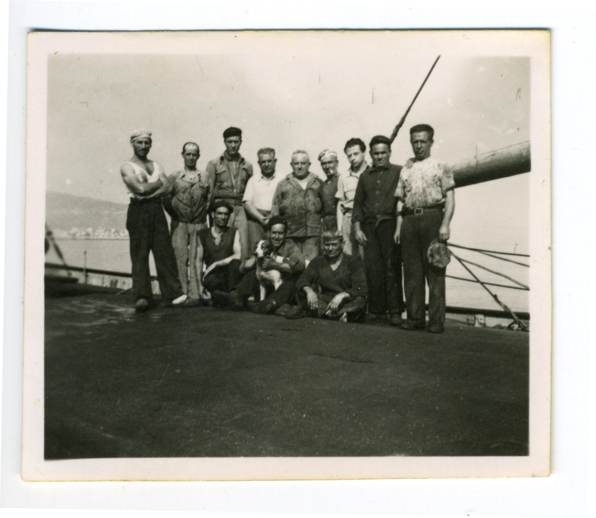 גדעונים על האוניה רקס- דניאלה, 04/1949